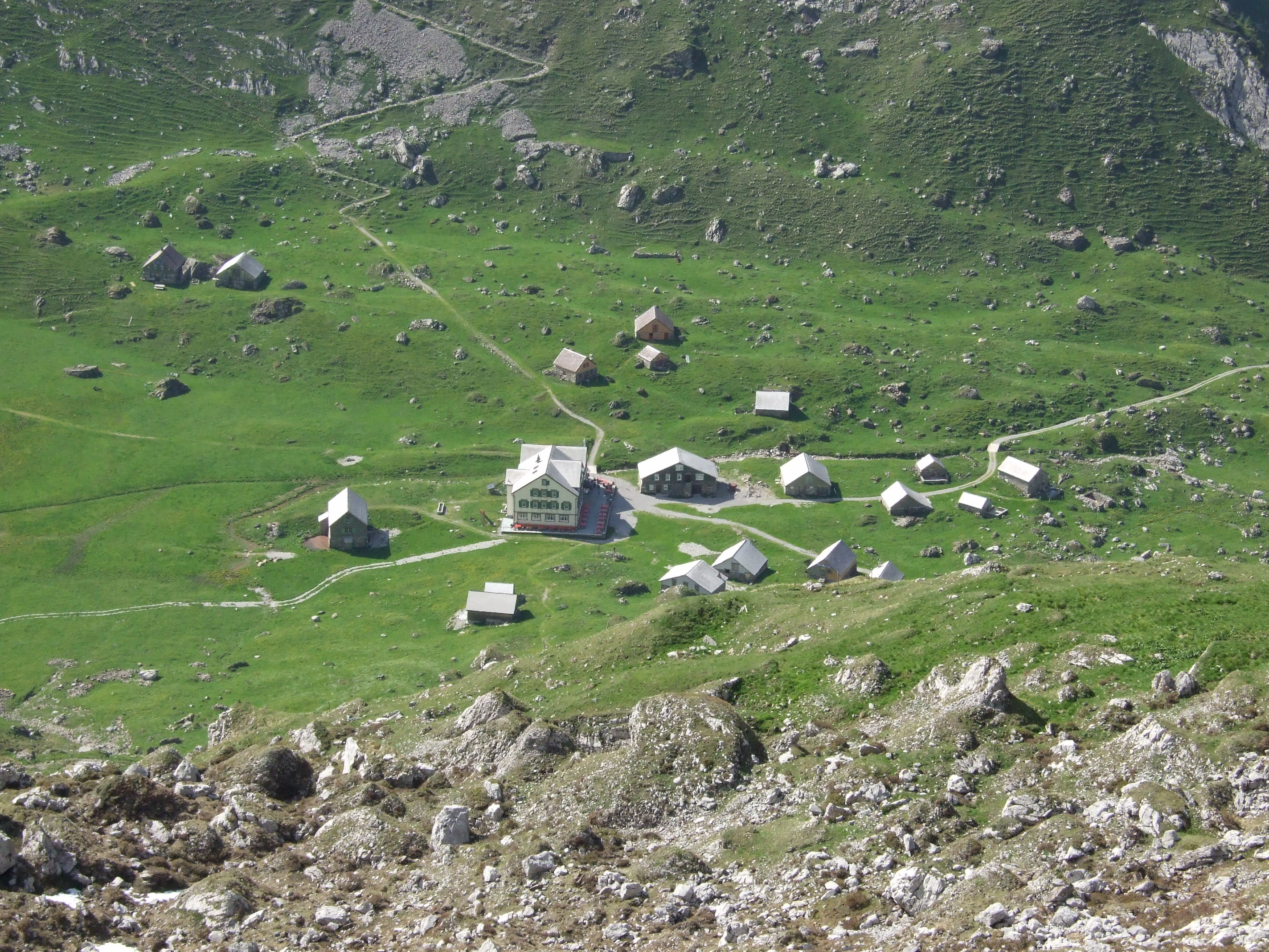 Meglisalp Alpstein Schweiz Suisse Switzerland